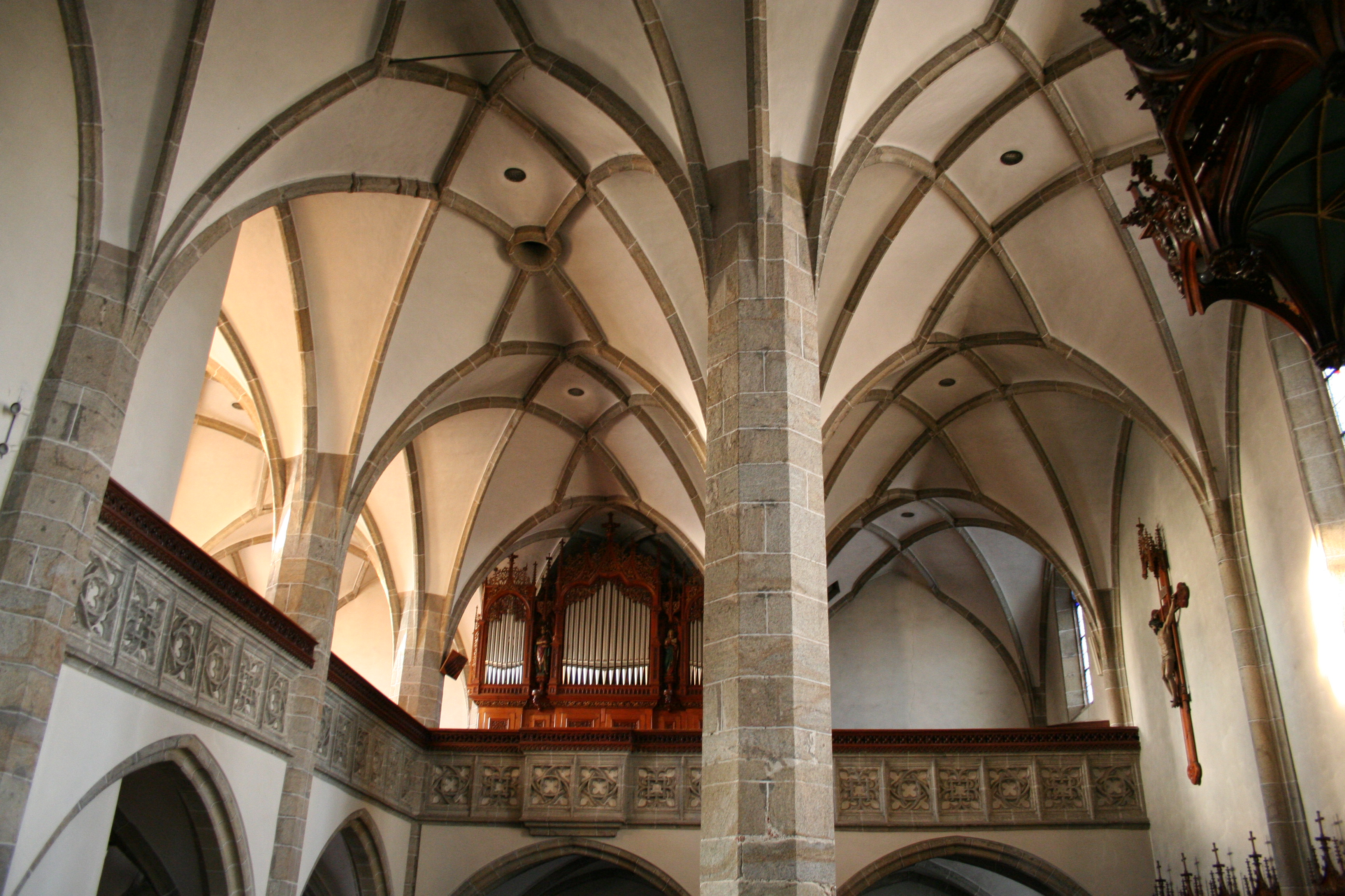 Kath. Pfarrkirche hl. Laurentius